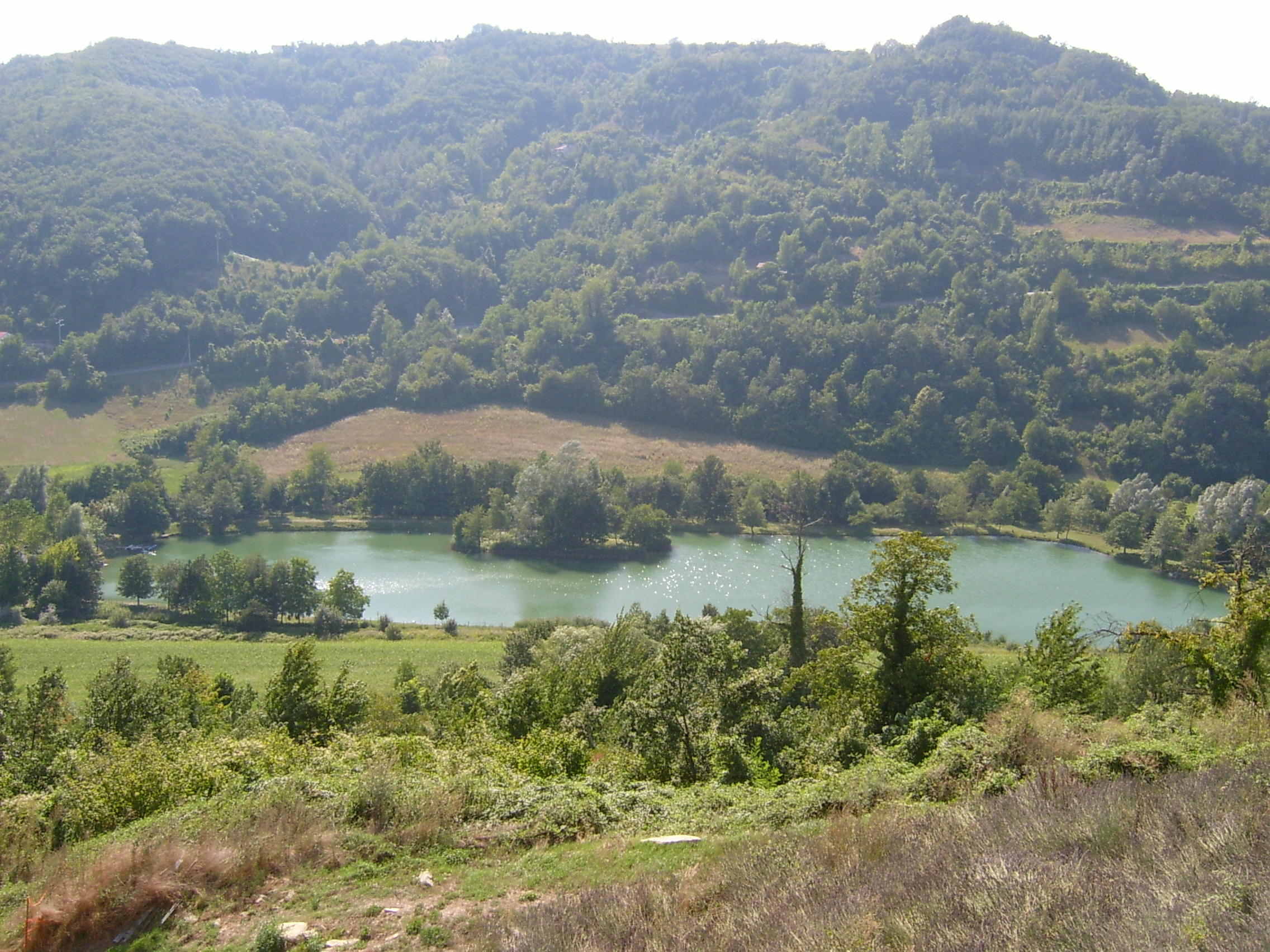 Fotografia del lago di San Benedetto Belbo, estate 2003